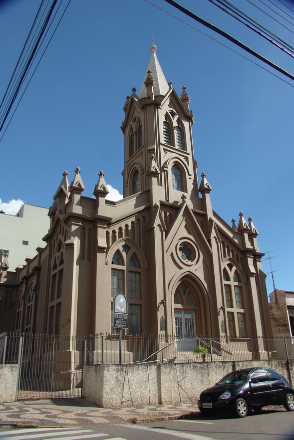 Imagem do município de Bauru, estado de São Paulo, Brasil.